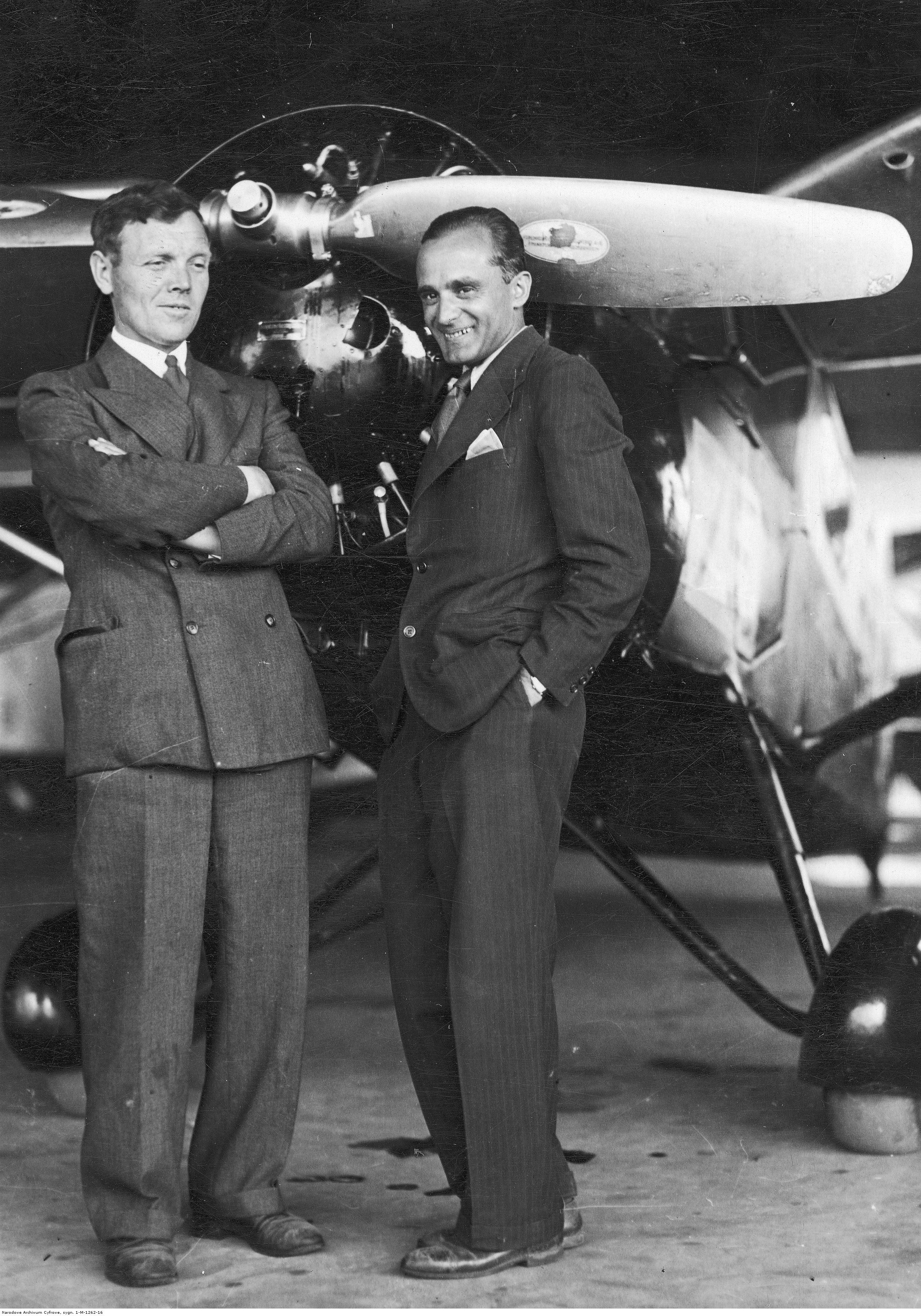 Międzynarodowe Zawody Samolotów Turystycznych (Challenge 1934) w Warszawie. Zdobywca drugiego miejsca w zawodach pilot Stanisław Płonczyński (z prawej) z mechanikiem Stanisławem Zientkiem przed samolotem RWD 9S. Koncern Ilustrowany Kurier Codzienny - Archiwum Ilustracji. Sygnatura: 1-M-1262-16